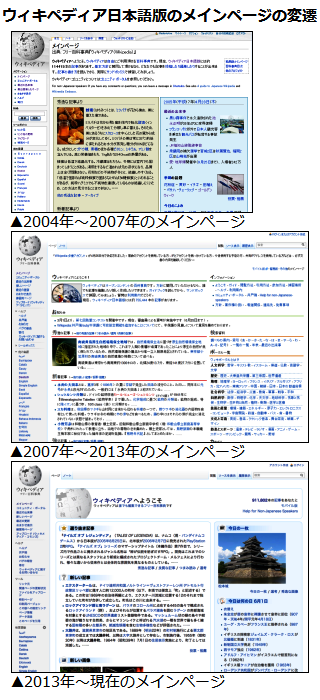 ウィキペディア日本語版のメインページの変遷